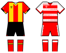 ديربي تونس العاصمة